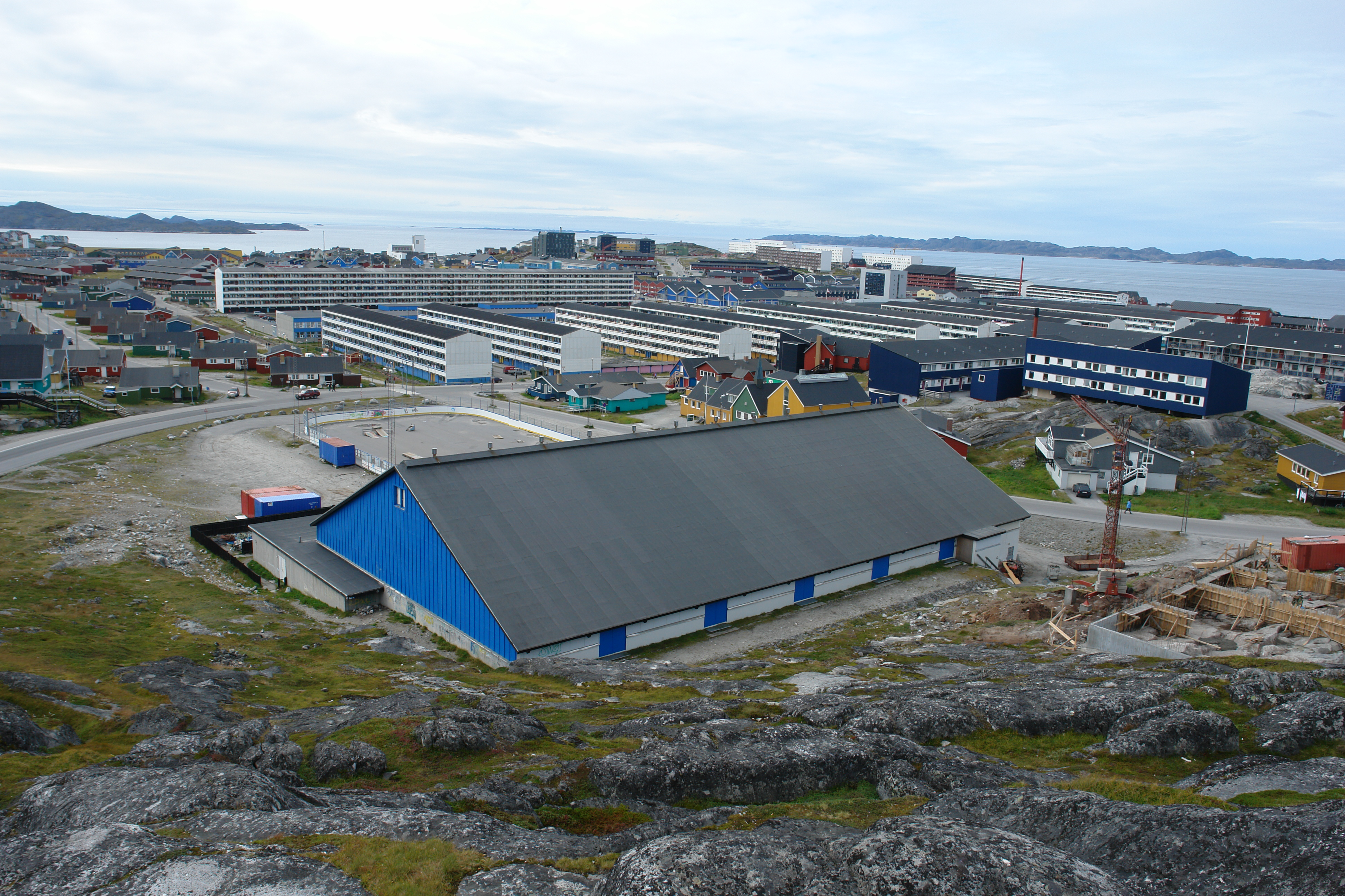 Greenland, Nuuk Godthabhallen